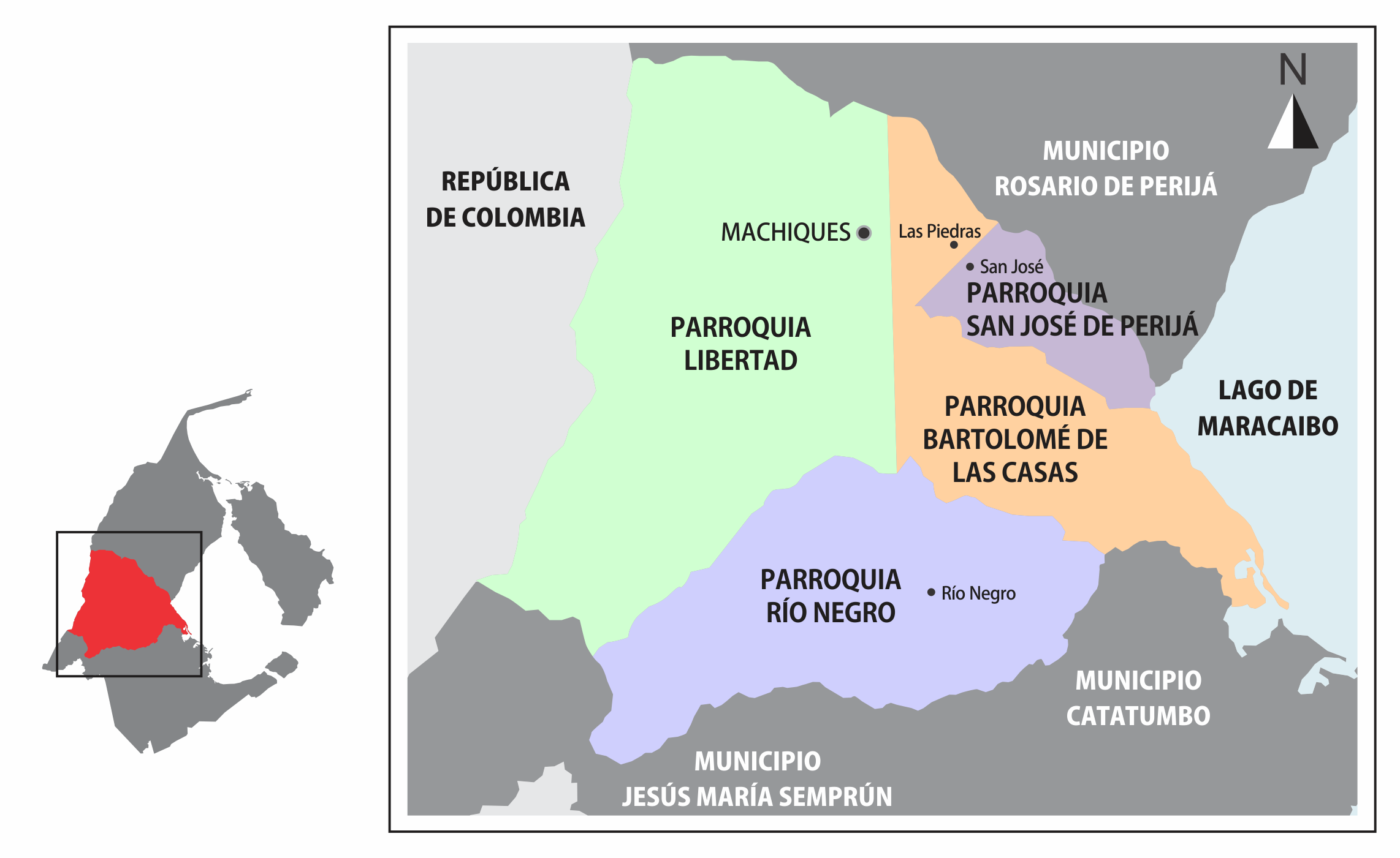 Ubicación de Municipio Machiques de Perijá Municipio: Machiques de Perijá. Fundada: 18 de Noviembre de 1841. Extensión Territorial: 10.361 Km2. Altitud: 100 msnm. Situación Geográfica: Norte: Municipio Rosario de Perijá, Sur: Municipio Catatumbo y Jesús María Semprun, Este: Lago de Maracaibo, Oeste: República de Colombia. Parroquias: Libertad, San José de Perijá, Bartolomé de las Casas y Río Negro. Etnias: Yukpa, Barí y Motilones. Clima: Tropical lluvioso de bosque y selva. Vegetación: Tipo bosque seco y bosque húmedo. Hidrografía: Río Negro, Río Apón, Río Macoita, Río Santa Ana, Río Yaza, Río Lora, Río Tokuko, Río Aricuizá. Relieve: Presenta relieva plano y montañoso abrupto. Economía: Ganadería, Agricultura, Cultivo de Café y Comercio. Religión: Católica y otras.